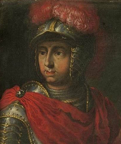 Détail d'un portrait d'Antoine de Vaudémont et de son épouse.